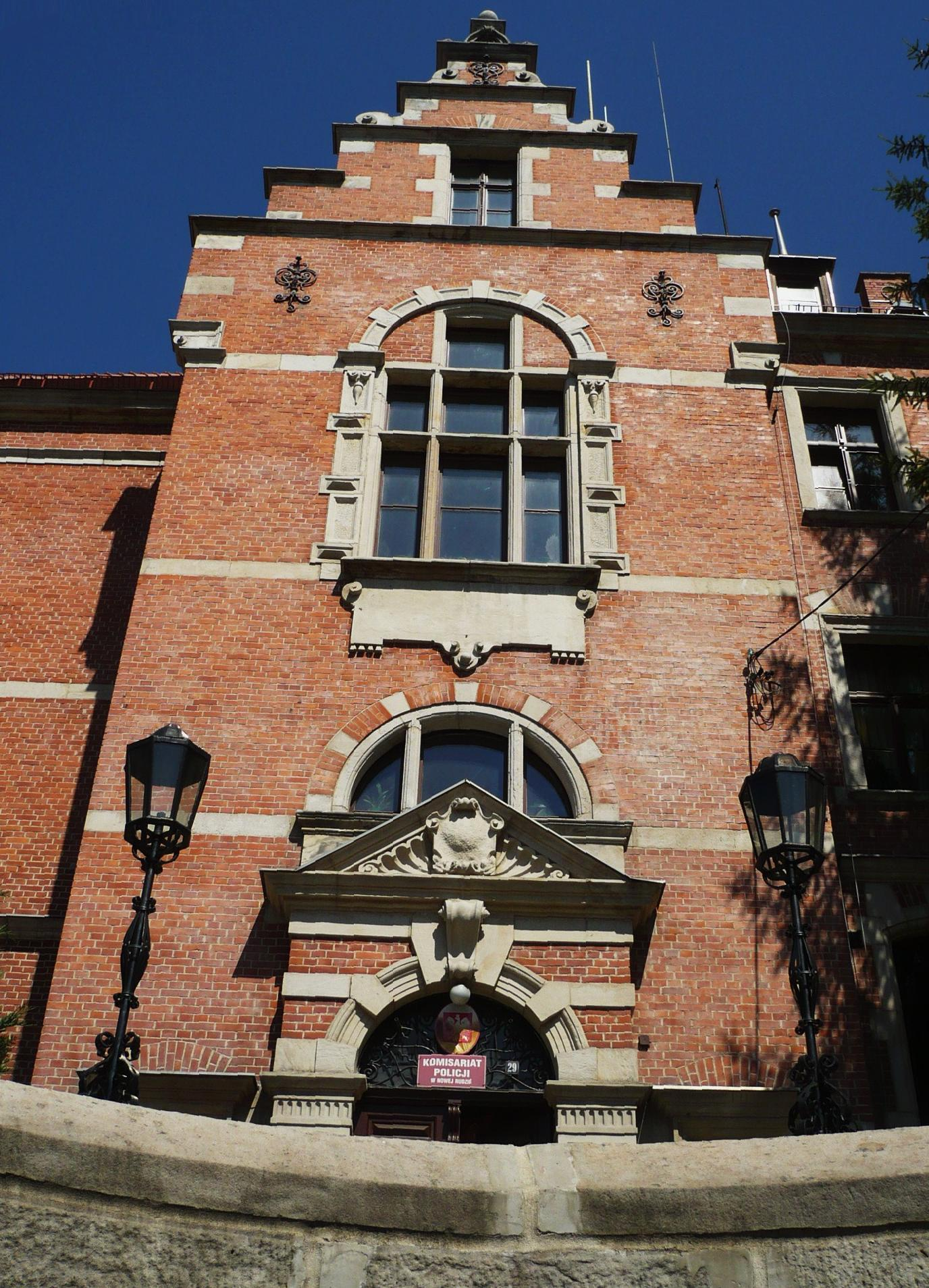 Nowa Ruda, ul. Bohaterów Getta 29 - pierwotnie sąd, obecnie komisariat policji, 1887-1889